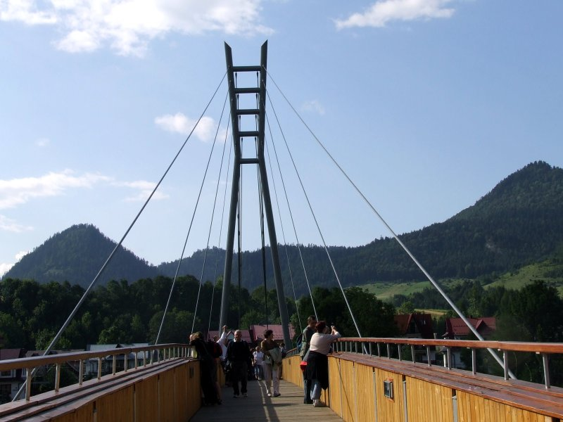 Turystyczne przejście graniczne Červený Kláštor - Sromowce Niżne